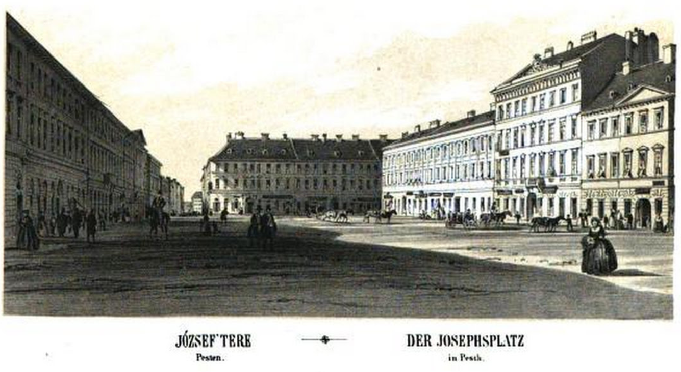 A József nádor tér (József tere) Rudolf Alt rajzán